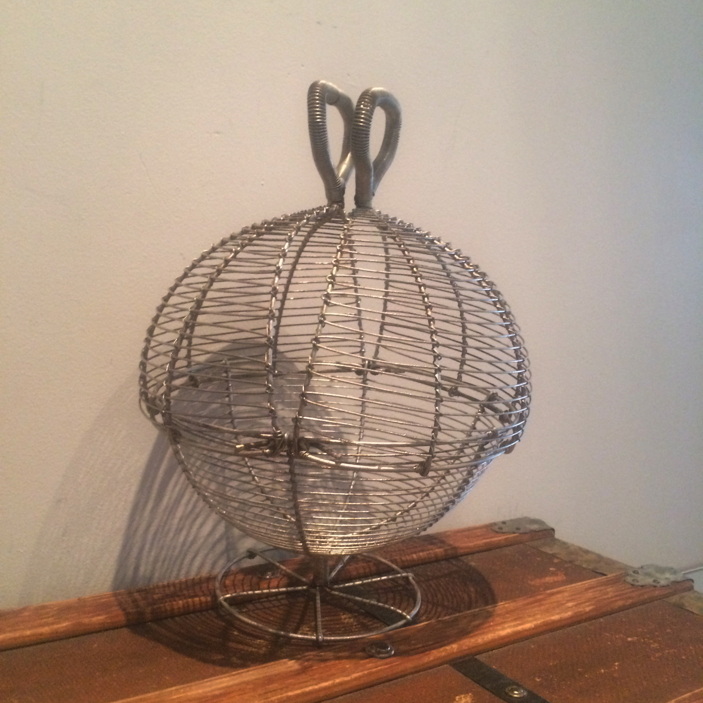 En fransk eggekurv i trådsløyd. 20. århundre